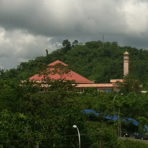 Masjid Daerah Kinabatangan